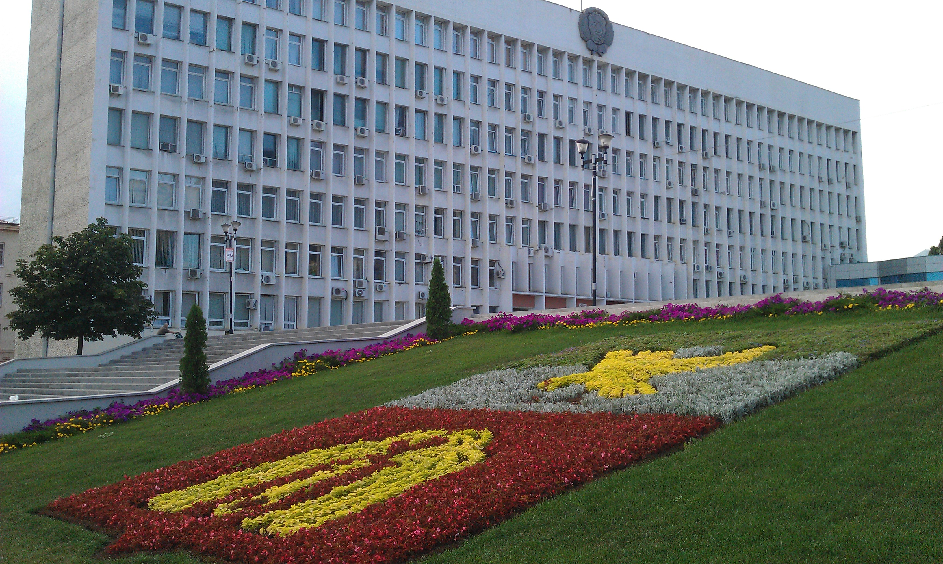 Вид со стороны улицы Козлова